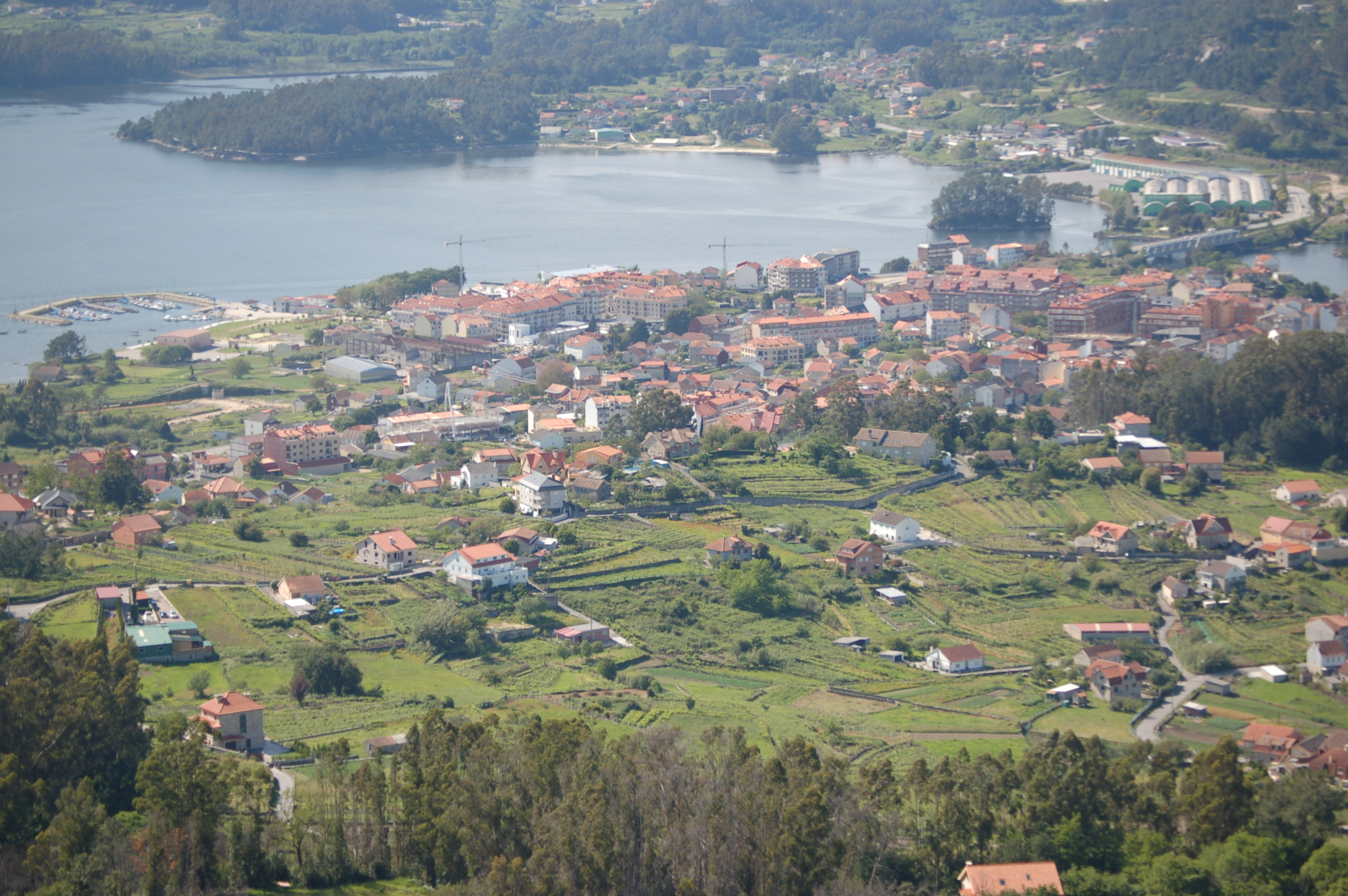 Vista xeral de Arcade (Soutomaior) desde o monte da Peneda (O Viso, Redondela)